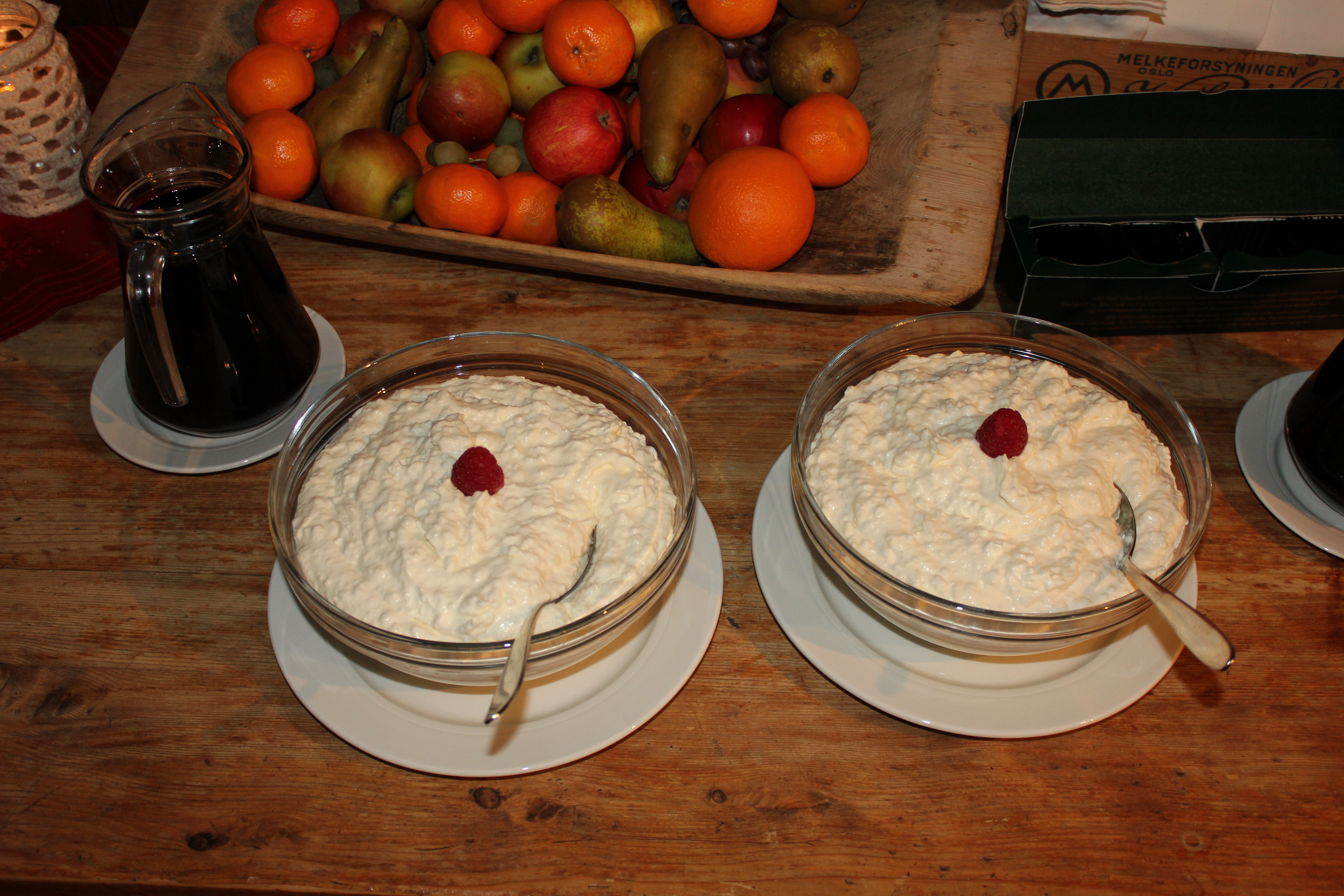 Riskrem.